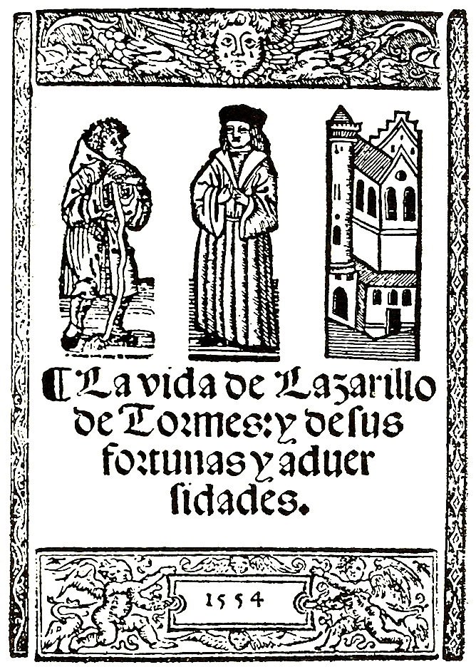 La vida de Lazarillo de Tormes, y de sus fortunas y aduersidades. Burgos, Juan de Junta, 1554.